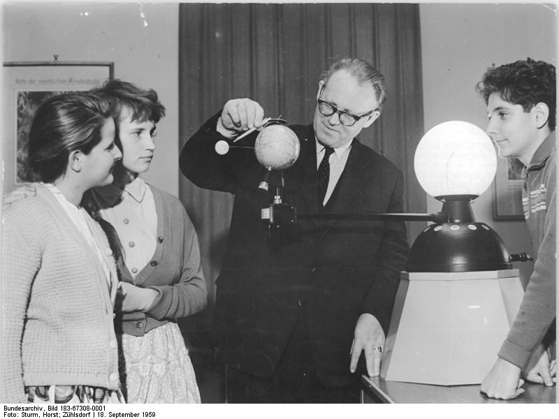 Berlin, Jugendstunde Zentralbild Sturm Zühlsdorf 18.9.1959 -Lunik- Sowjetische Mondrakete - interessantes Thema für Jugendstunde UBz: Interessiert verfolgen Teilnehmer einer Jugendstunde zur Vorbereitung auf die Jugendweihe in der Berliner Archenhold-Sternwarte die Erklärungen von Prof. Wattenberg über den Weg, den die sowjetische Rakete zum Mond genommen hat. Die Jungen und Mädchen sind von der 29. Grundschule.